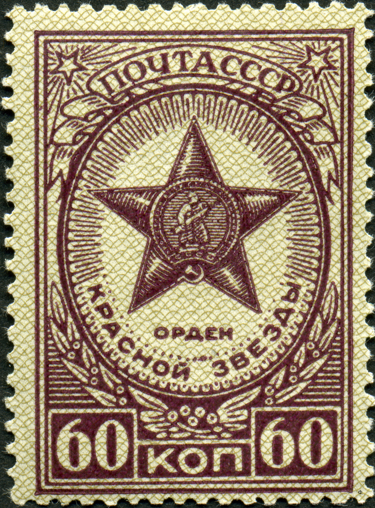 Марка СССР